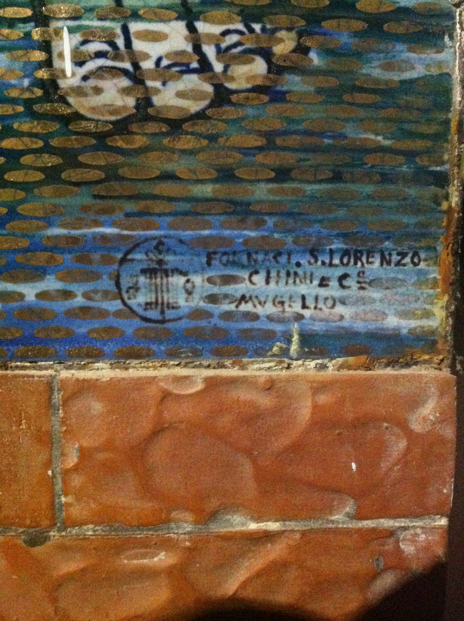 Firma Marchio Fornaci San Lorenzo